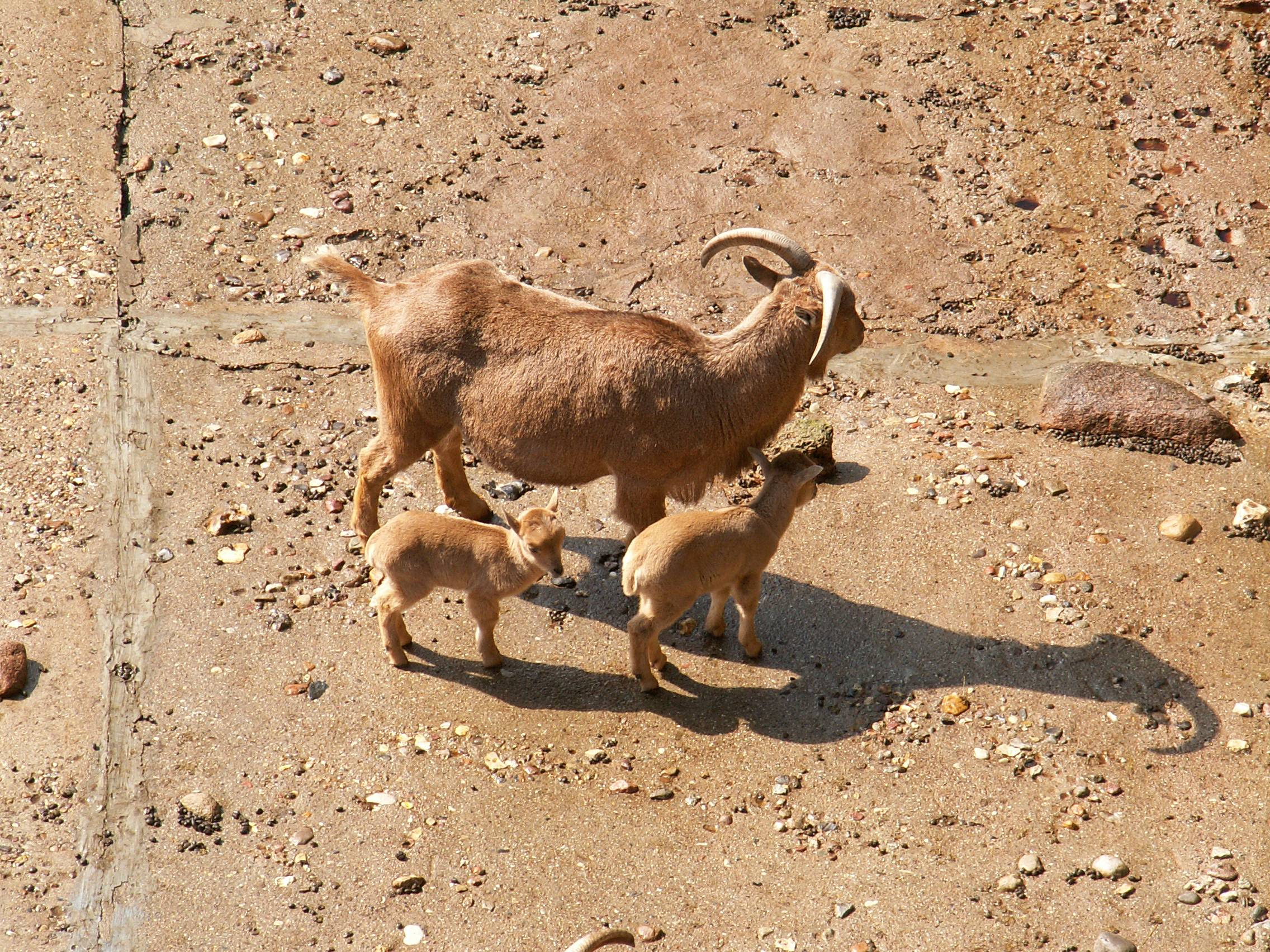 Mähnenspringer Ammotragus lervia in Hagenbecks Tierpark, Hamburg, Deutschland